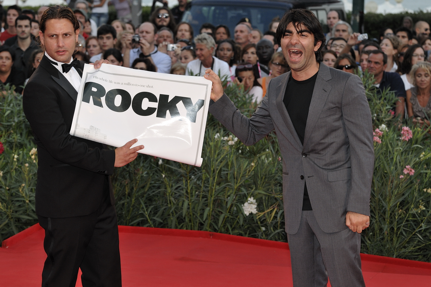 66ème Festival du Cinéma de Venise (Mostra), 11ème jour (12/09/2009) Tapis rouge pour la soirée de cloture du Festival de Venise 2009. Adam Bousdoukos et Fatih Akin avec une affiche du film Rocky - un film qui a marqué leur jeunesse. Bousdoukos fera dédicacer cette affiche à Sylvester Stallone, présent à la Mostra ce jour-là pour recevoir un prix honorifique.